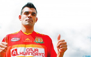 Andrés Formento, jugador de fútbol profesional.